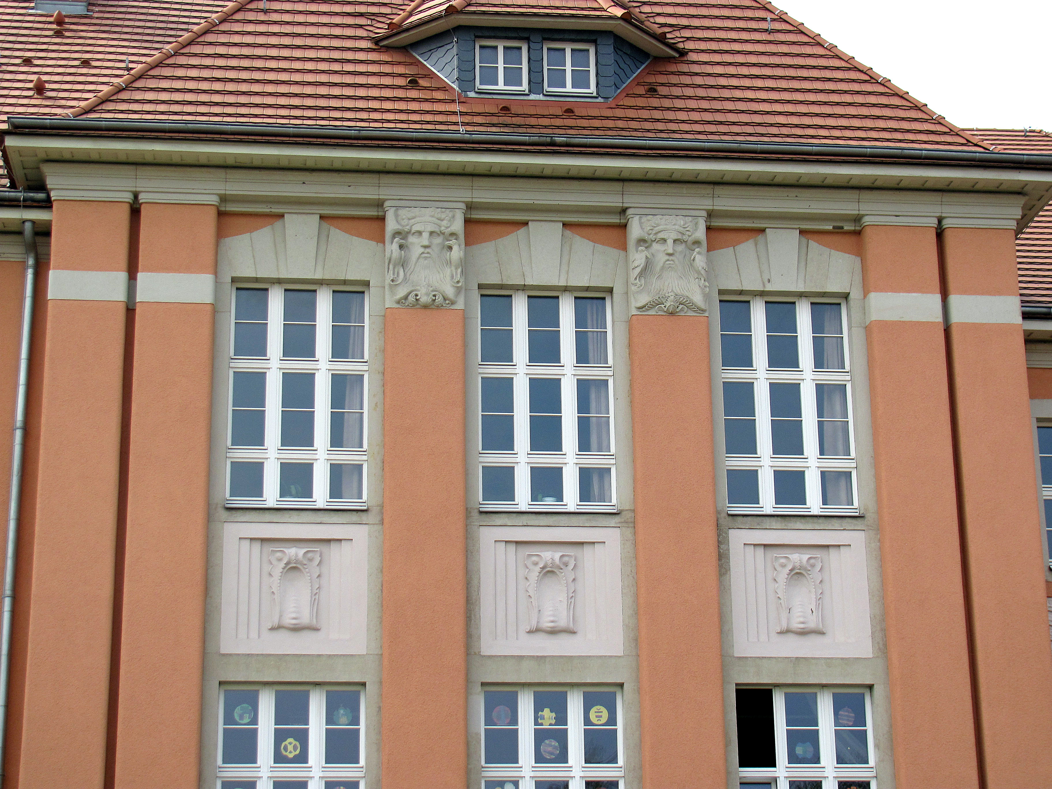 Radebeul, Amtsgericht Kötzschenbroda, Details des westlichen Risalits